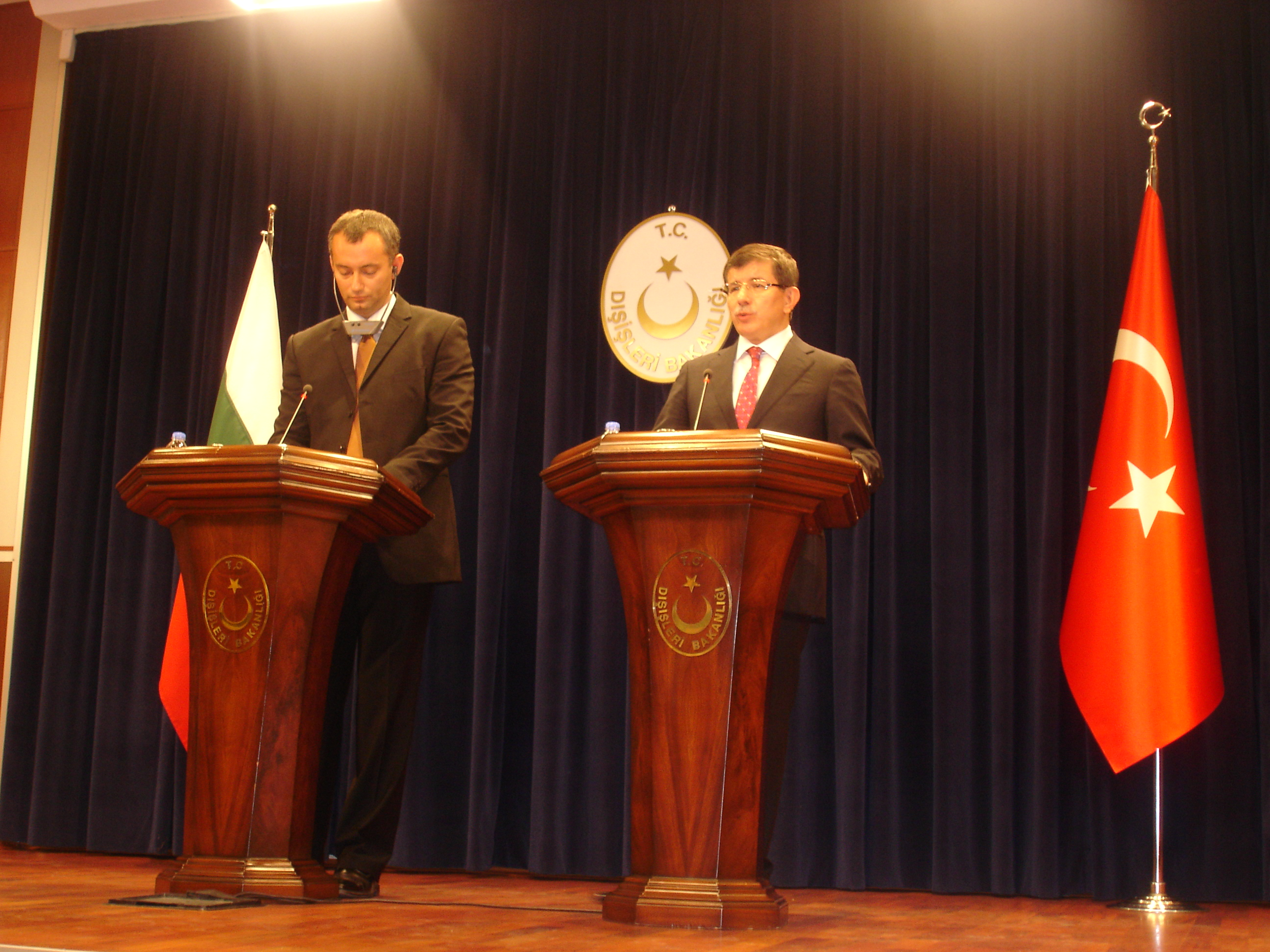 Николай Младенов и Ахмед Давутоглу